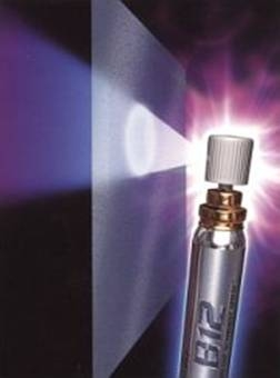 Vitaminspray - A hatóanyagok leggyorsabb felszívódási módja